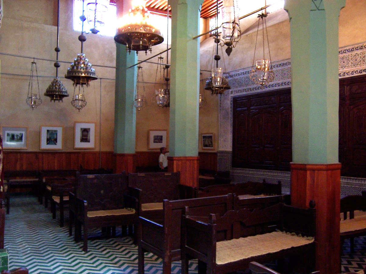 Fez, Morocco